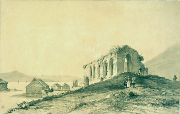 Kirkjubøur, Faroe Islands 1839